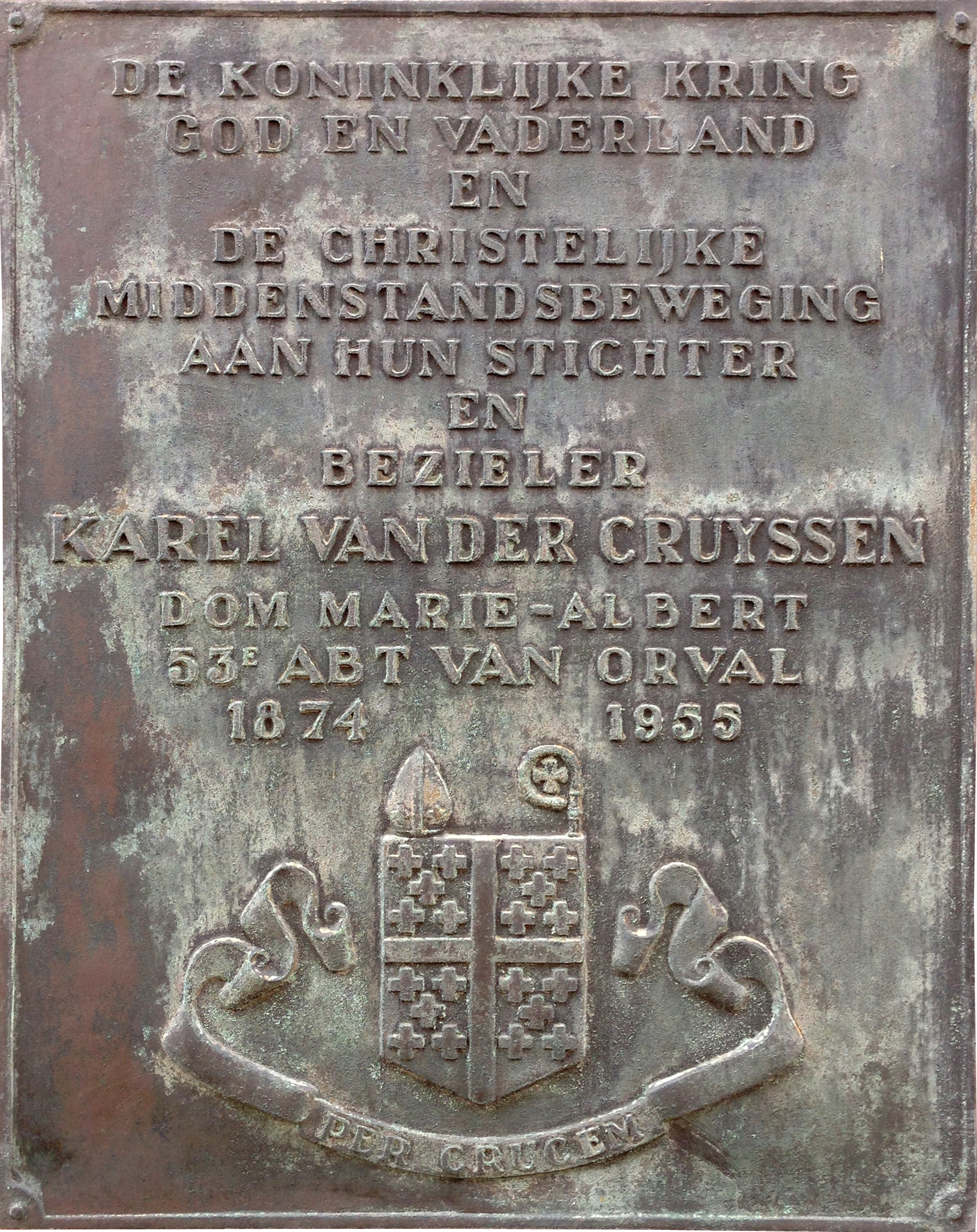 Gedenkplaat Karel Van der Cruyssen in Gent